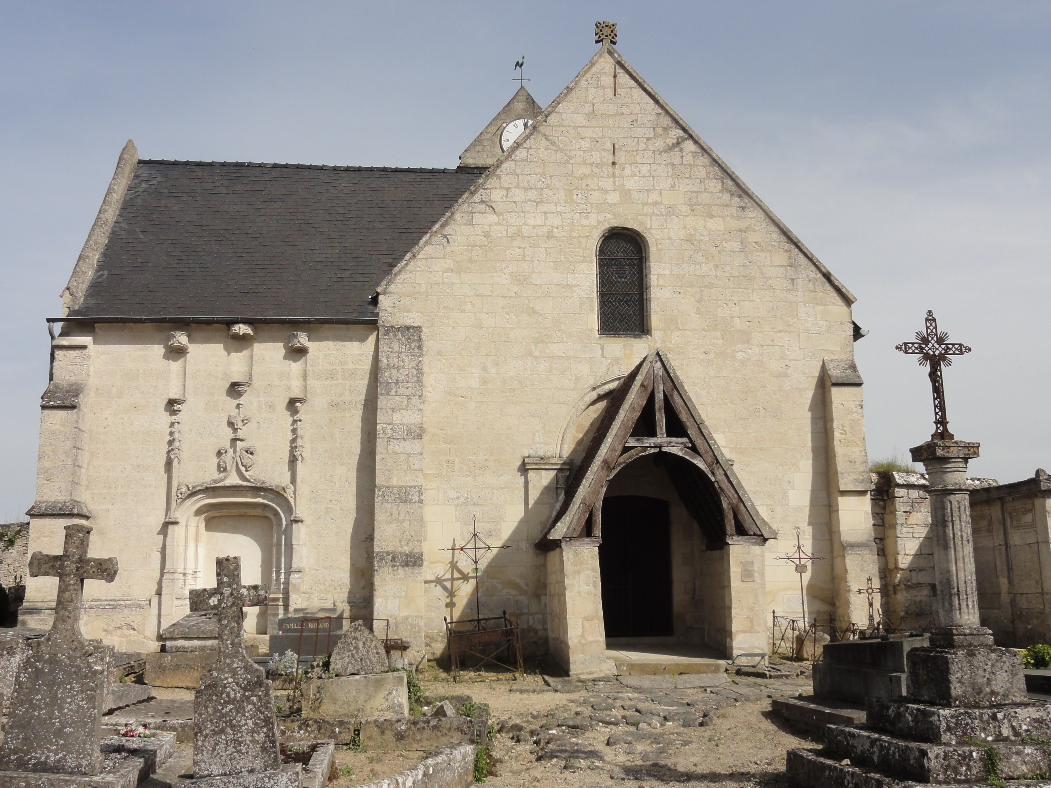 Église Saint-Pierre de Duvy (voir titre).